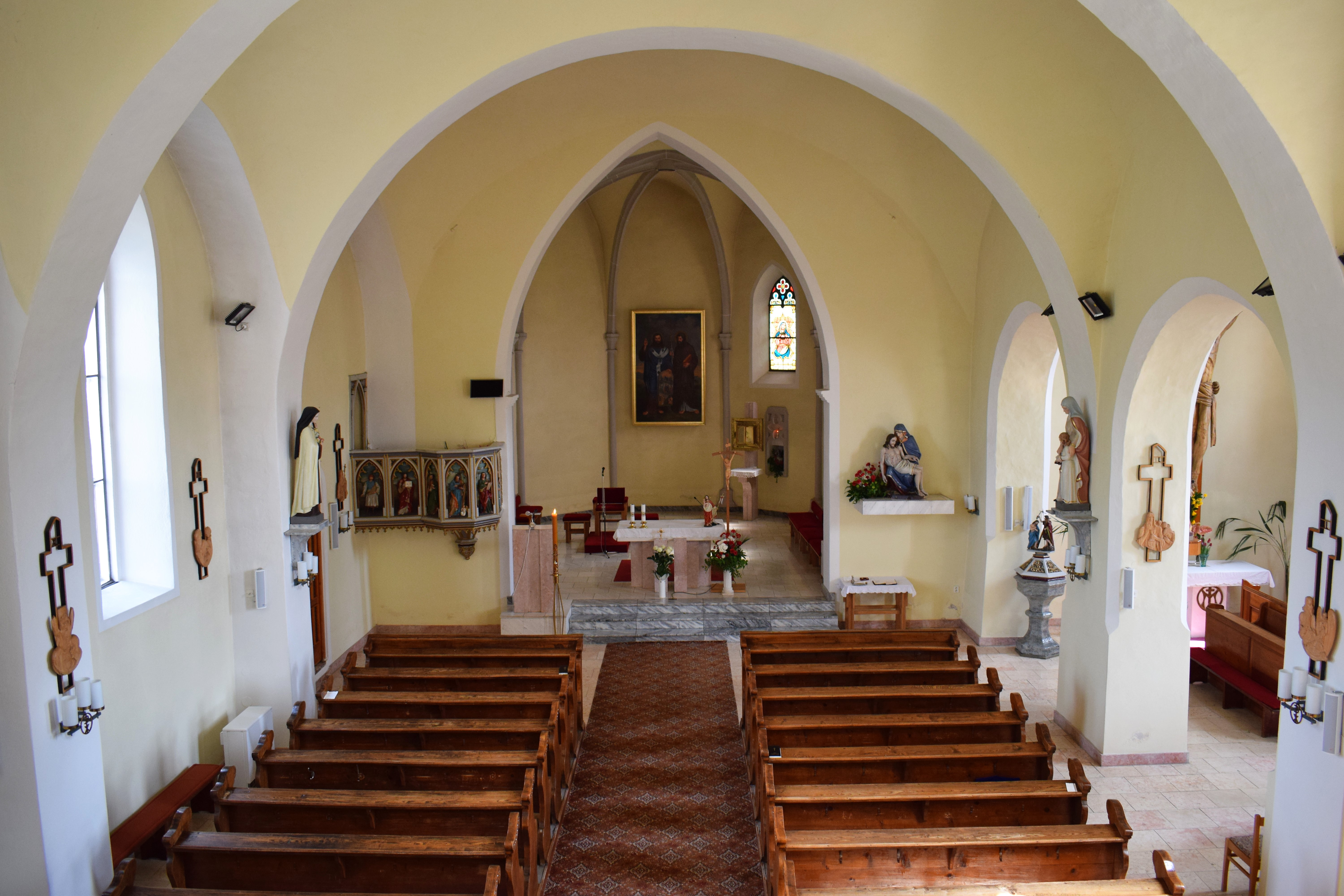 interiér kostola z vrchného poschodia